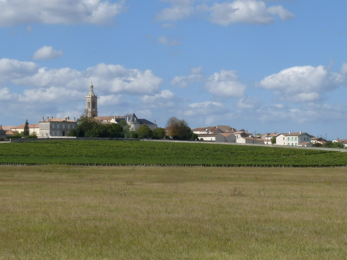 St-Estèphe, Gironde, France. Vue du sud-est (Pey Moulin)